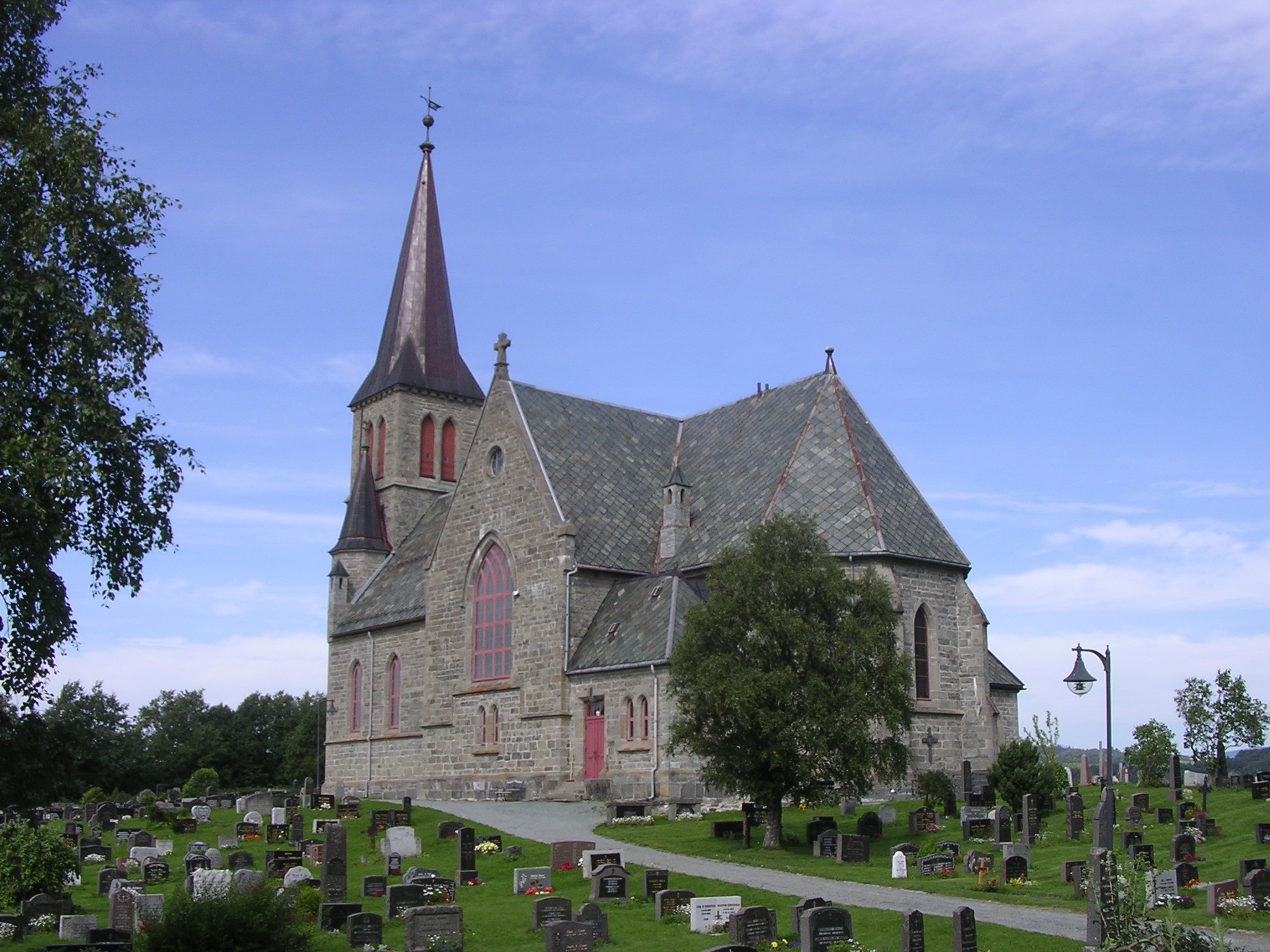 Melhus kirke i Melhus kommune, Sør-Trøndelag